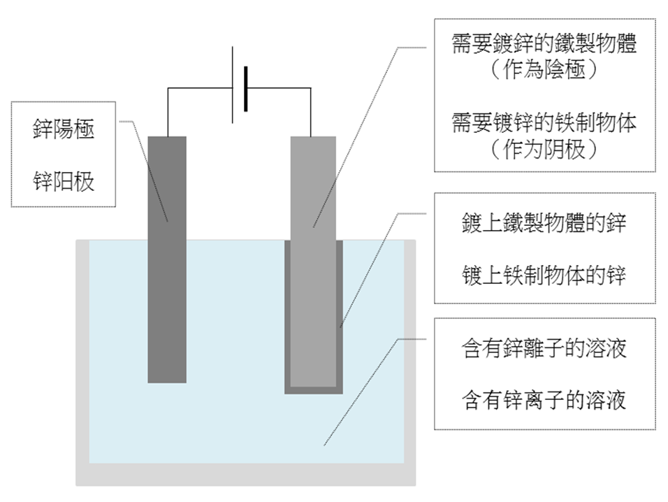 中文（香港）: 電鍍鋅的簡單電化學原理